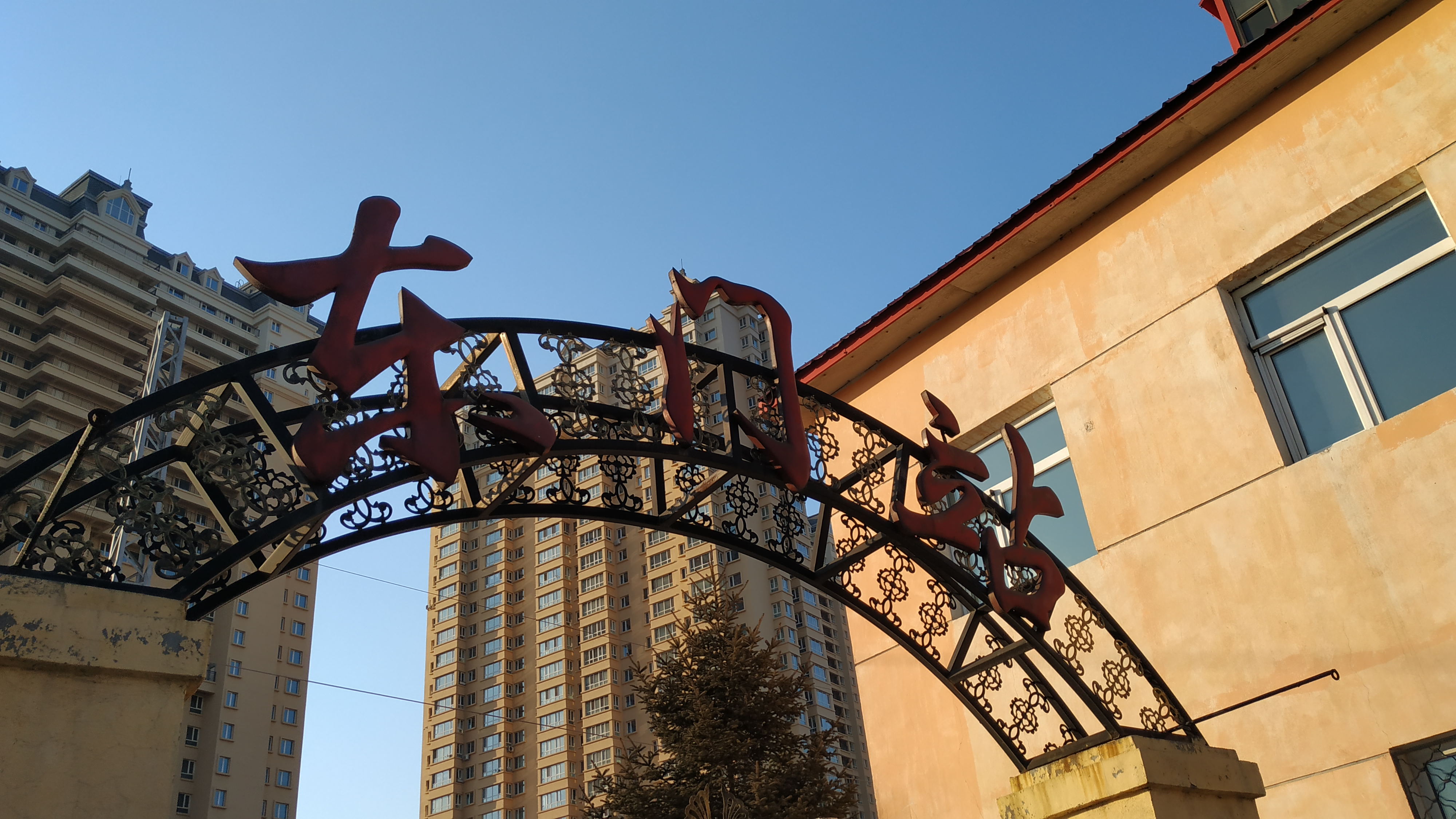 中文（中国大陆）: 东门站名字